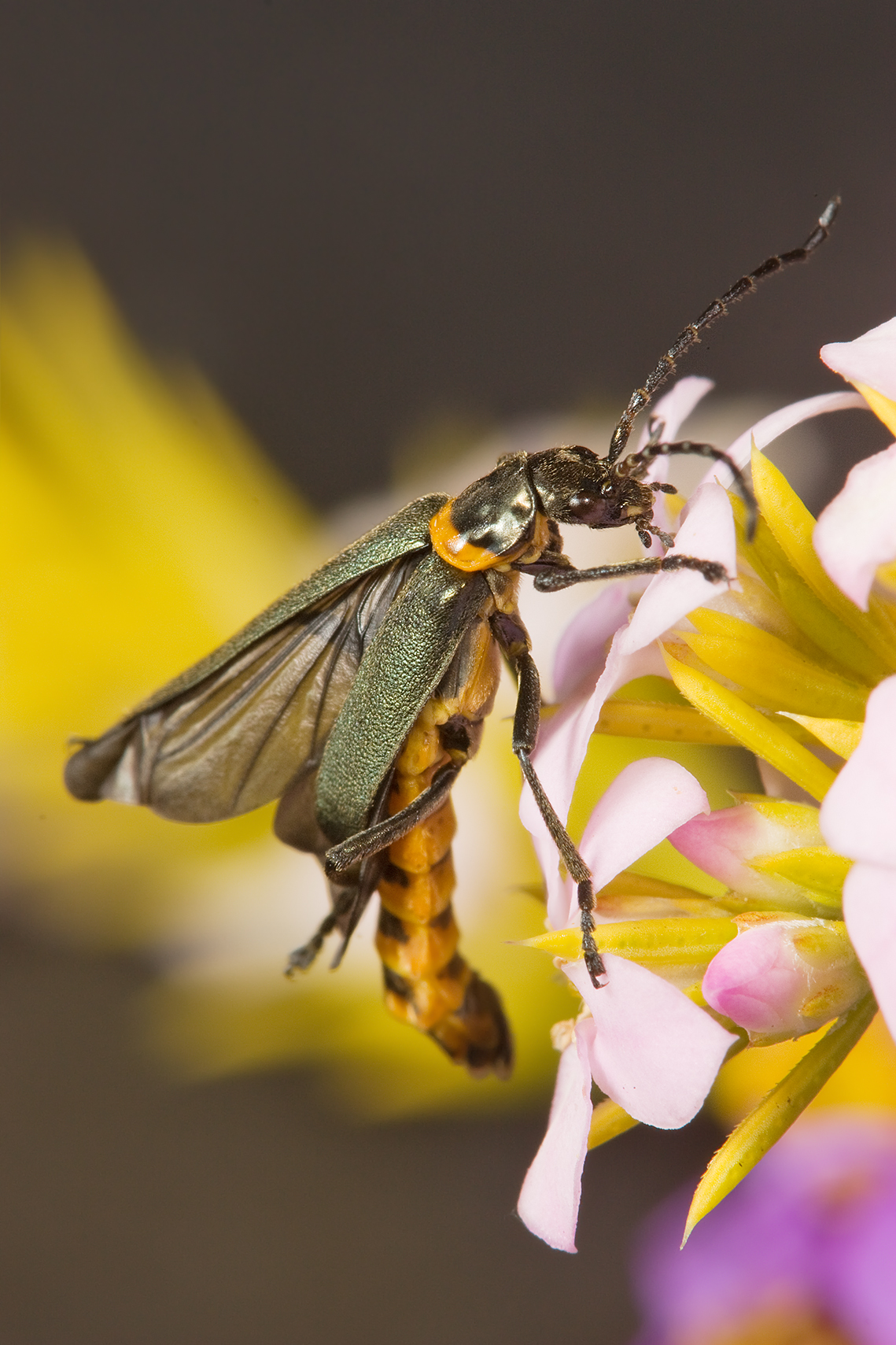 1.2 only